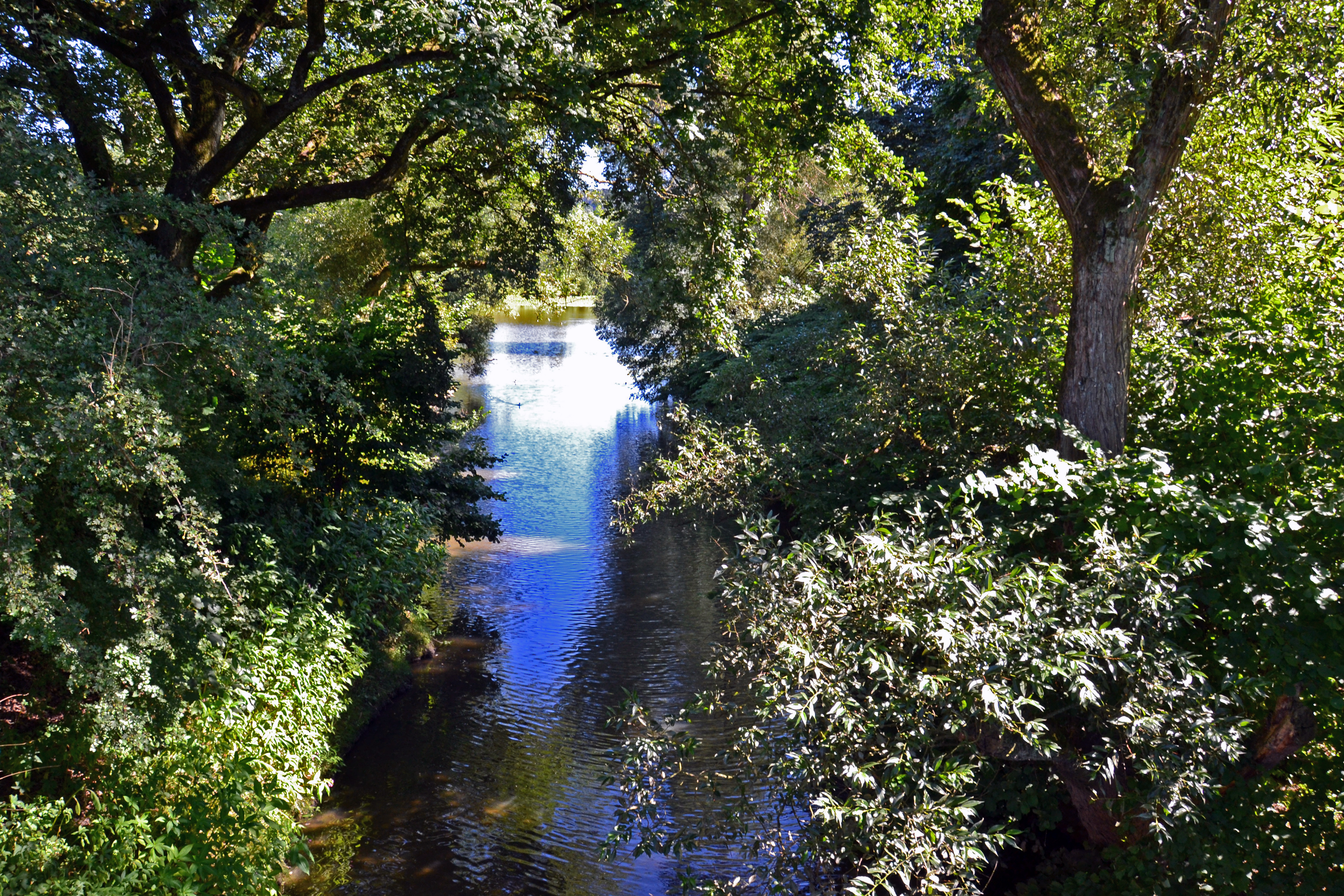 Hafenbecken des ehemaligen Hafen Holtey an der Ruhr in Essen